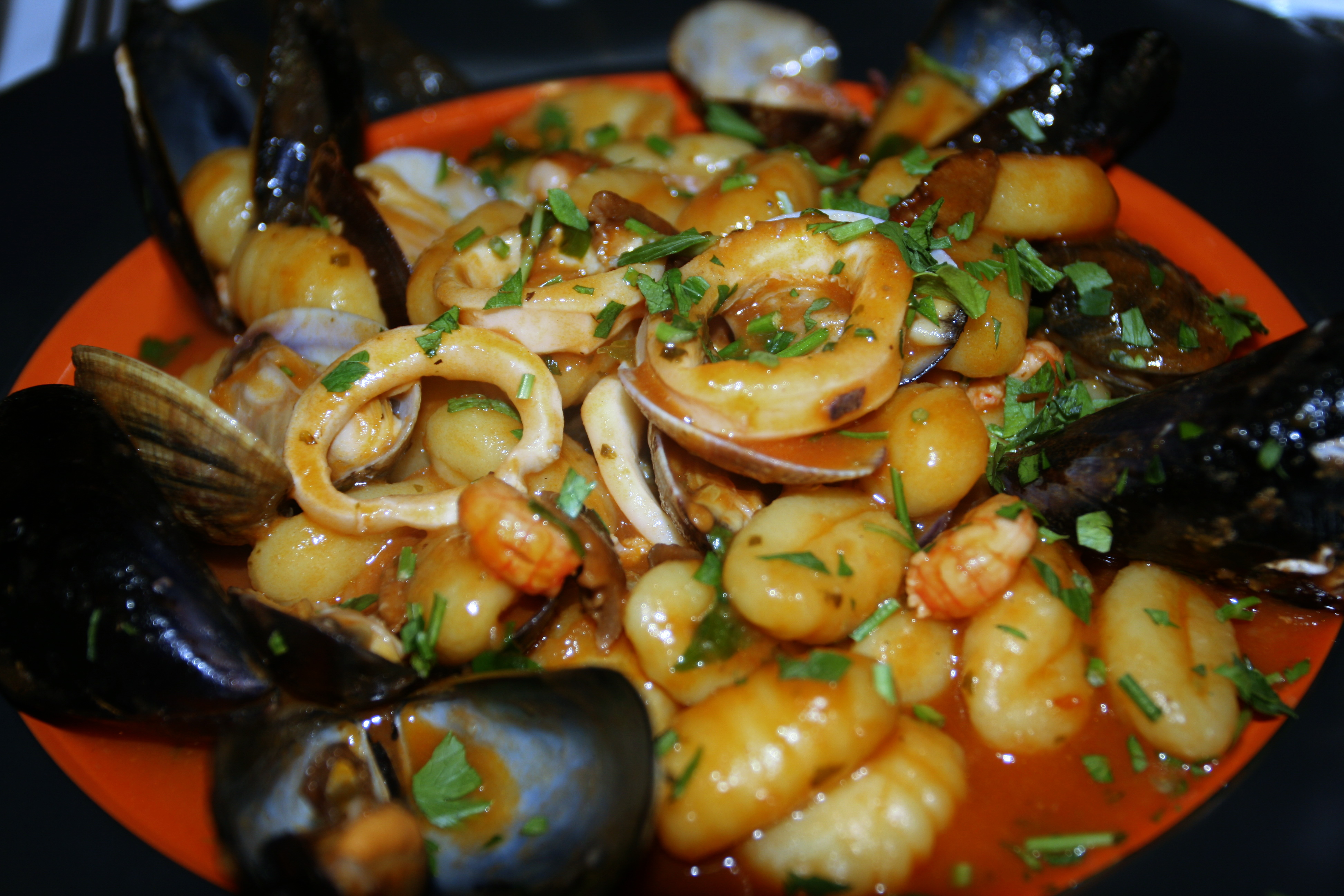 Gnocchi mare e monti (Siracusa, Sicilia)